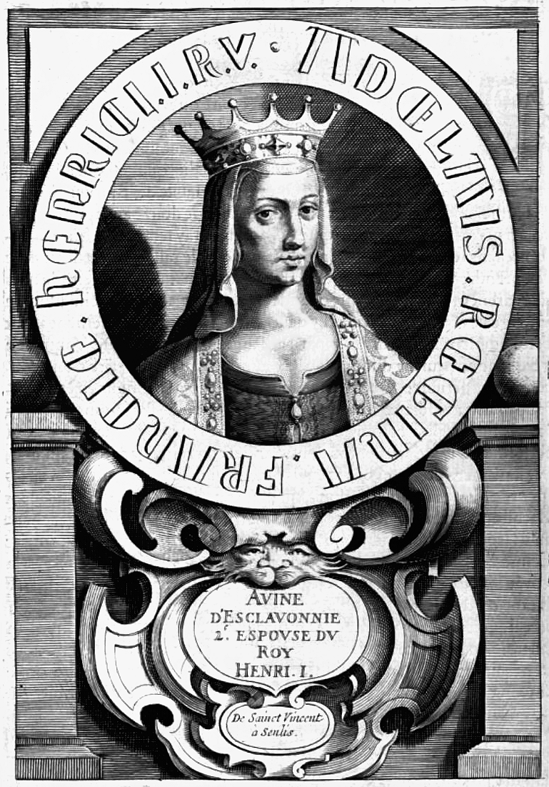 "Анна Слов'янська, друга дружина короля Генрика І". Портрет Анни Ярославни з розписів, які знаходилися в монастирі святого Вінкента, Санліс.